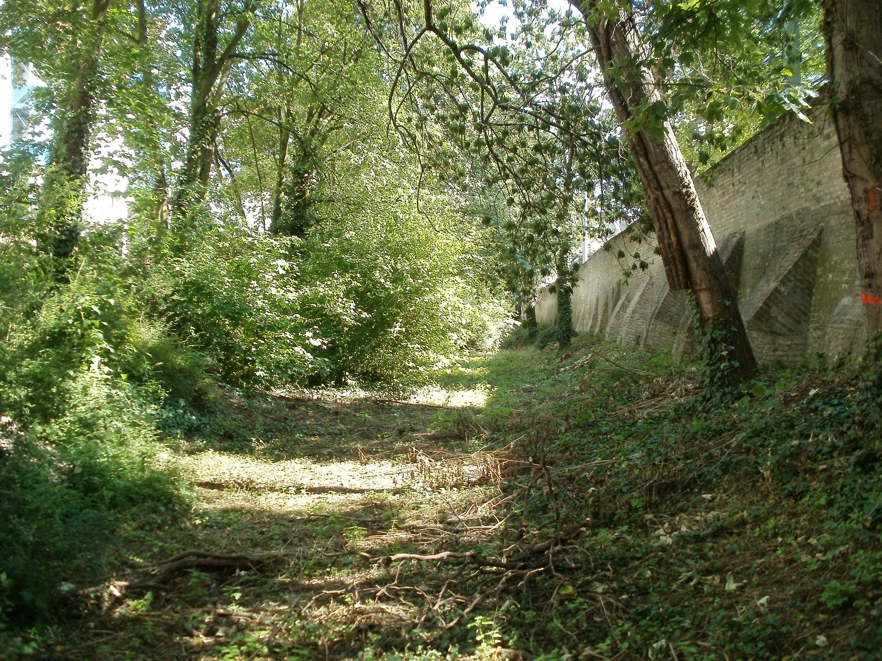 Stadtmauerrest am Postgraben in Speyer